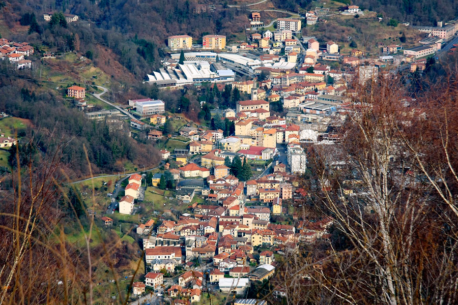 Panorama di Valduggia dal Monte Fenera